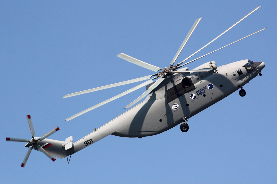 Rostvertol Mil Mi-26T2